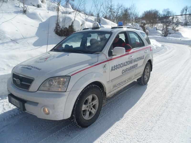 Mezzo fuoristrada dell'Associazione Nazionale Carabinieri